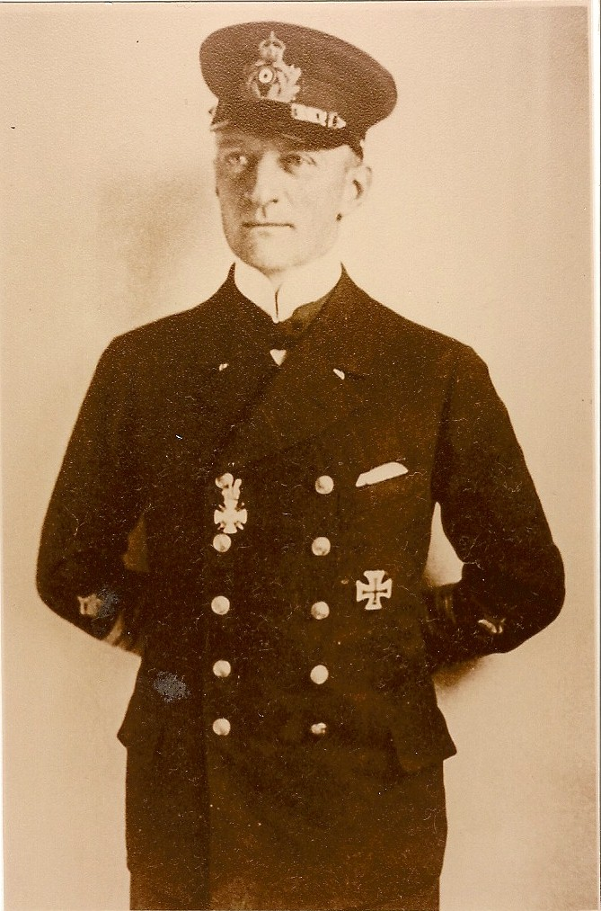 Christoph Moritz von Egidy (* Pirna 27. 6. 1870, + Langfeld, Kr. Flensburg, 5.1.1937) war ein kaiserlich deutscher Kapitän zur See und im Ersten Weltkrieg Kommandant des Großen Kreuzers „Seydlitz“.